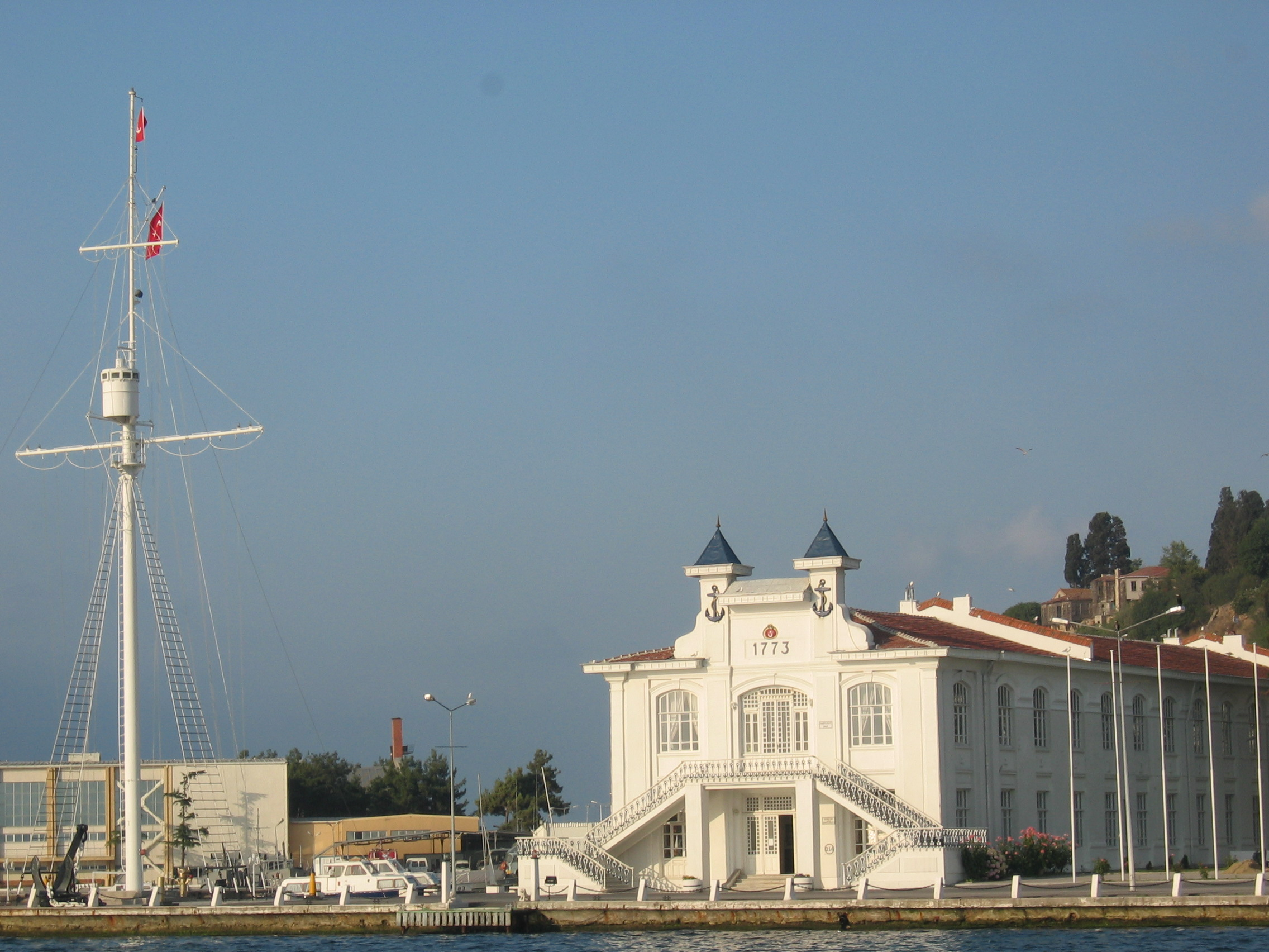 Kategori:İstanbul resimleri